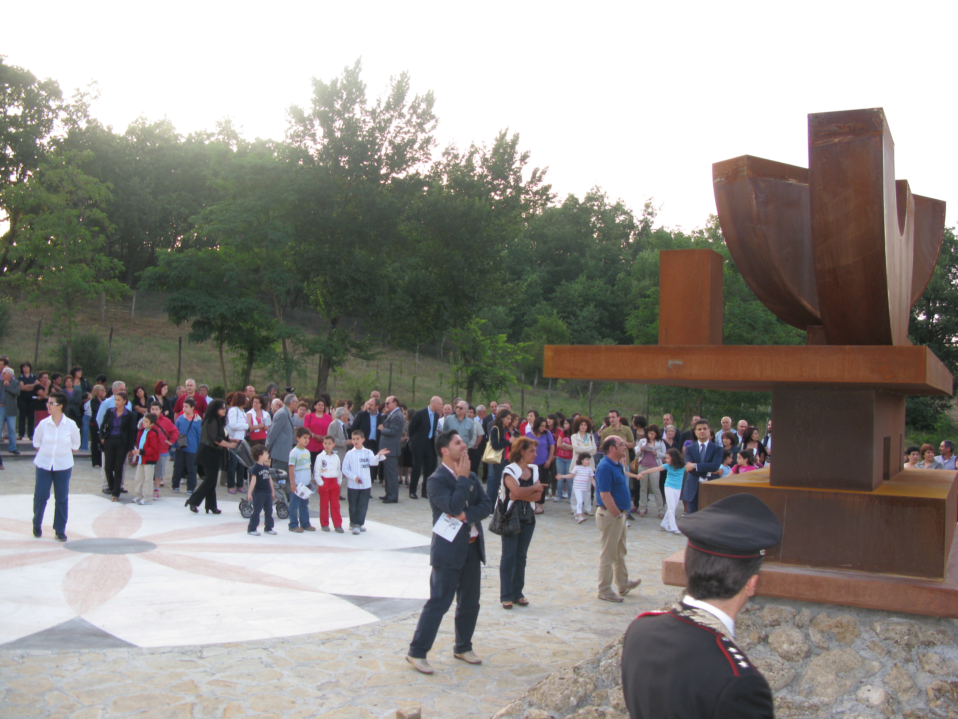 Réalisation de 4 scupltures monumentale àTeana Basilicata, Italie